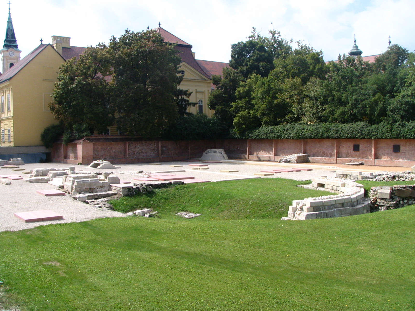 Ruins Garden in Székesfehérvár (Hungary)